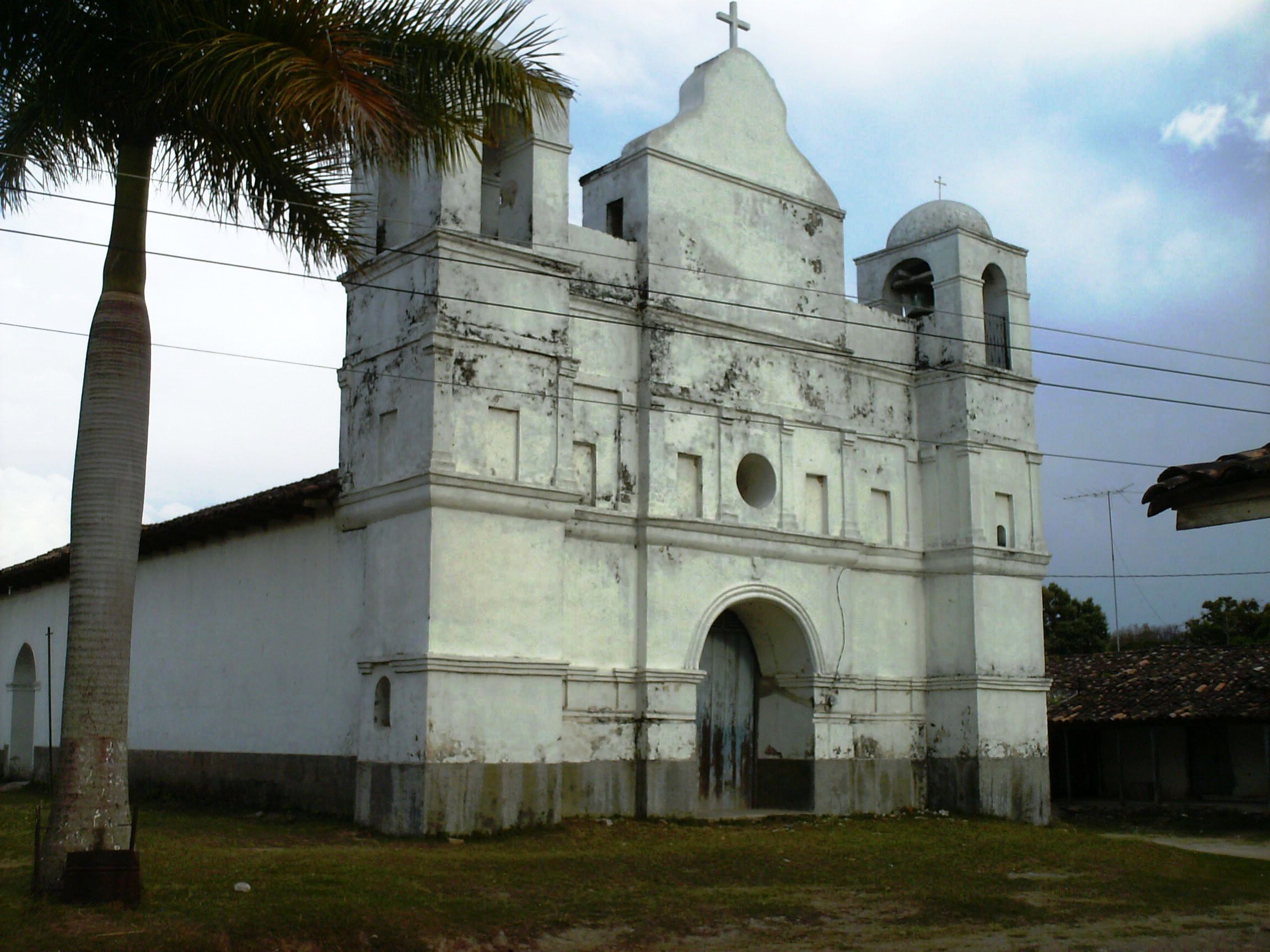 La Plaza Municipal de Tambla 2019.